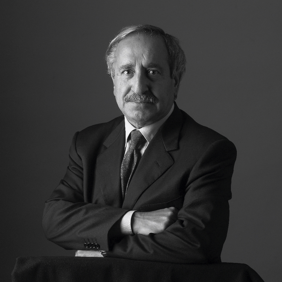 Vittorio Mancini